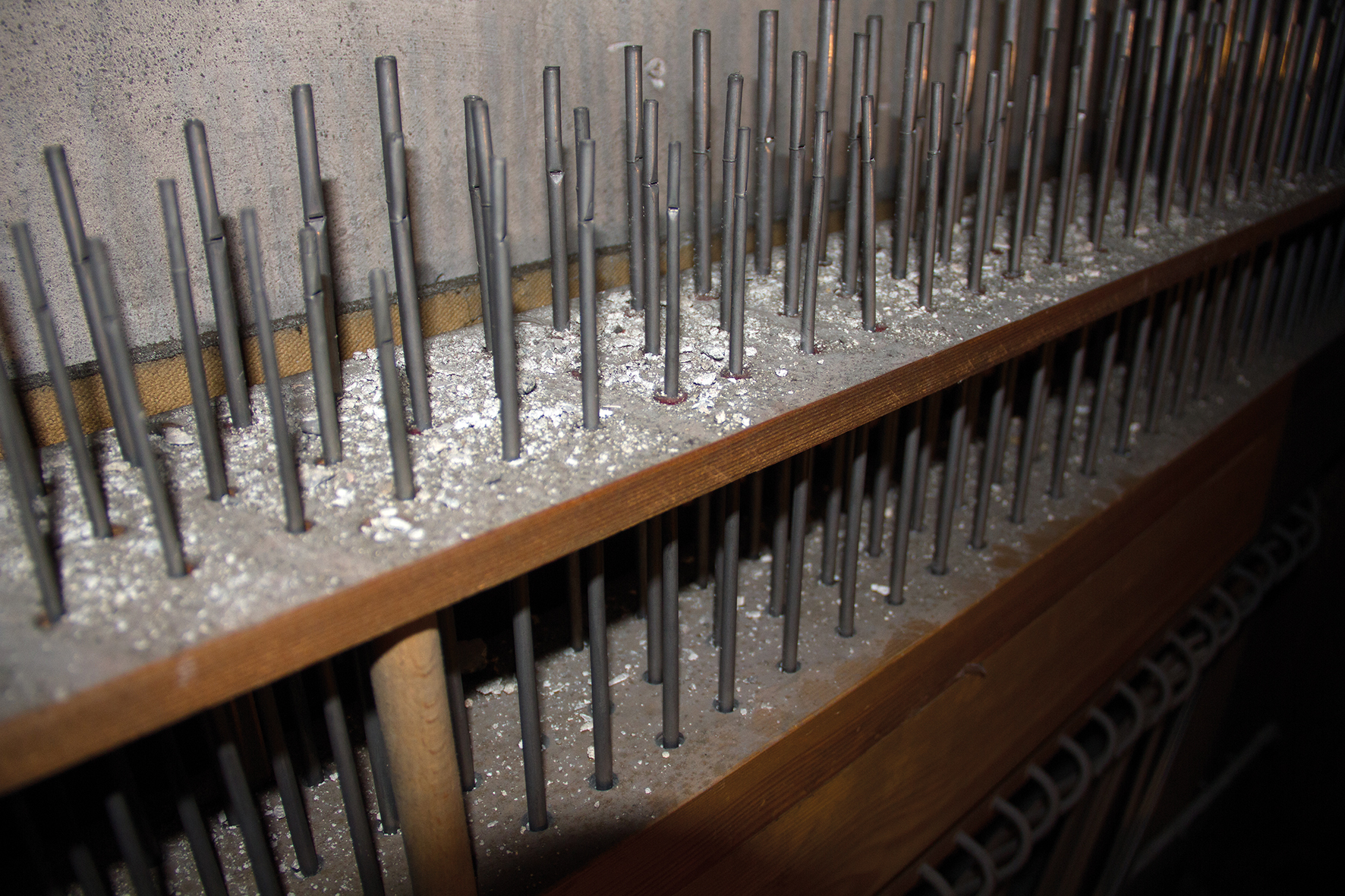 Windlade, Pfeifenstock und Pfeifen des Registers Zimbel der Strebel-Orgel in St. Michael zu Stadtsteinach. Das Foto dokumentiert den Zustand 2017.